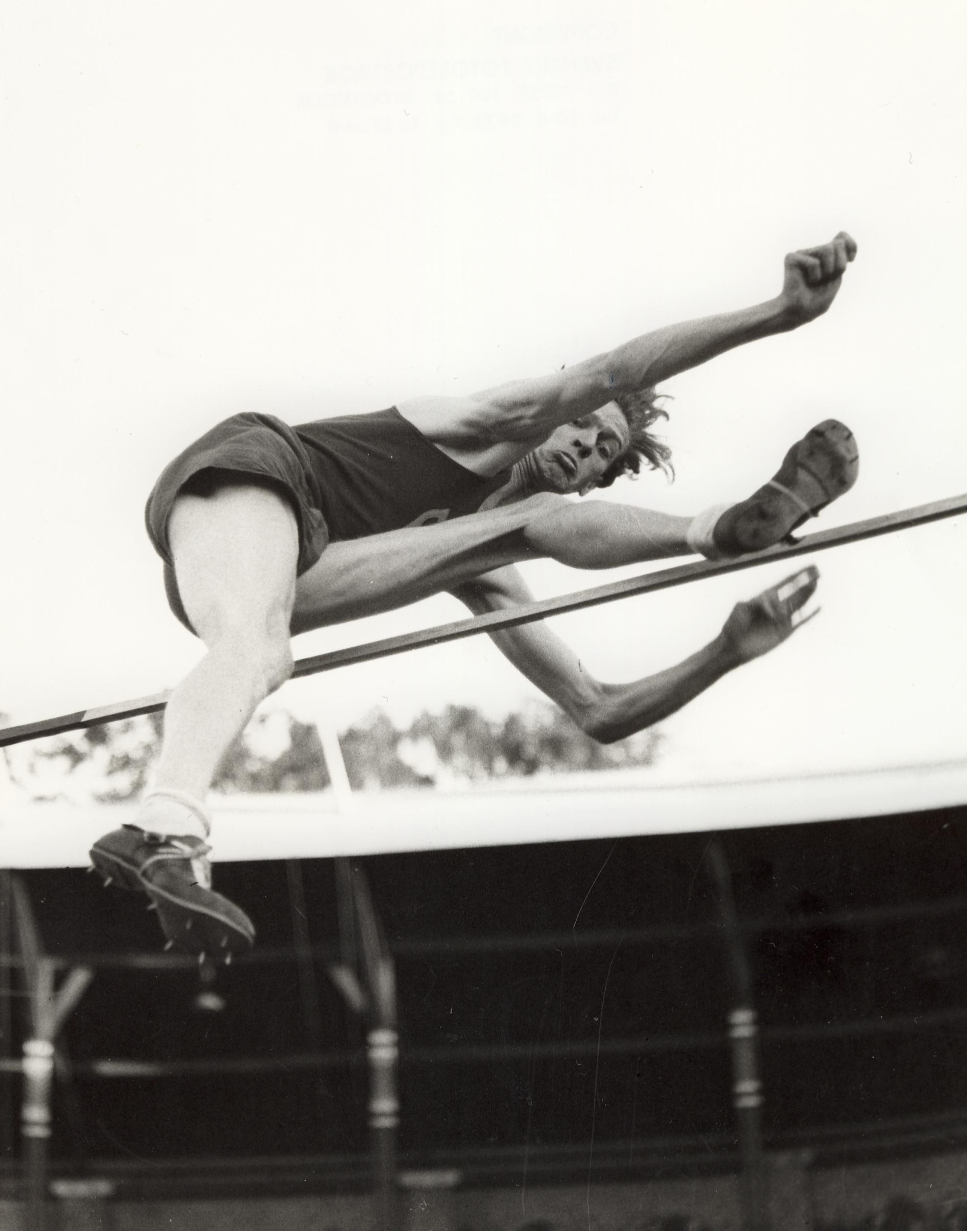 Åke Ödmark